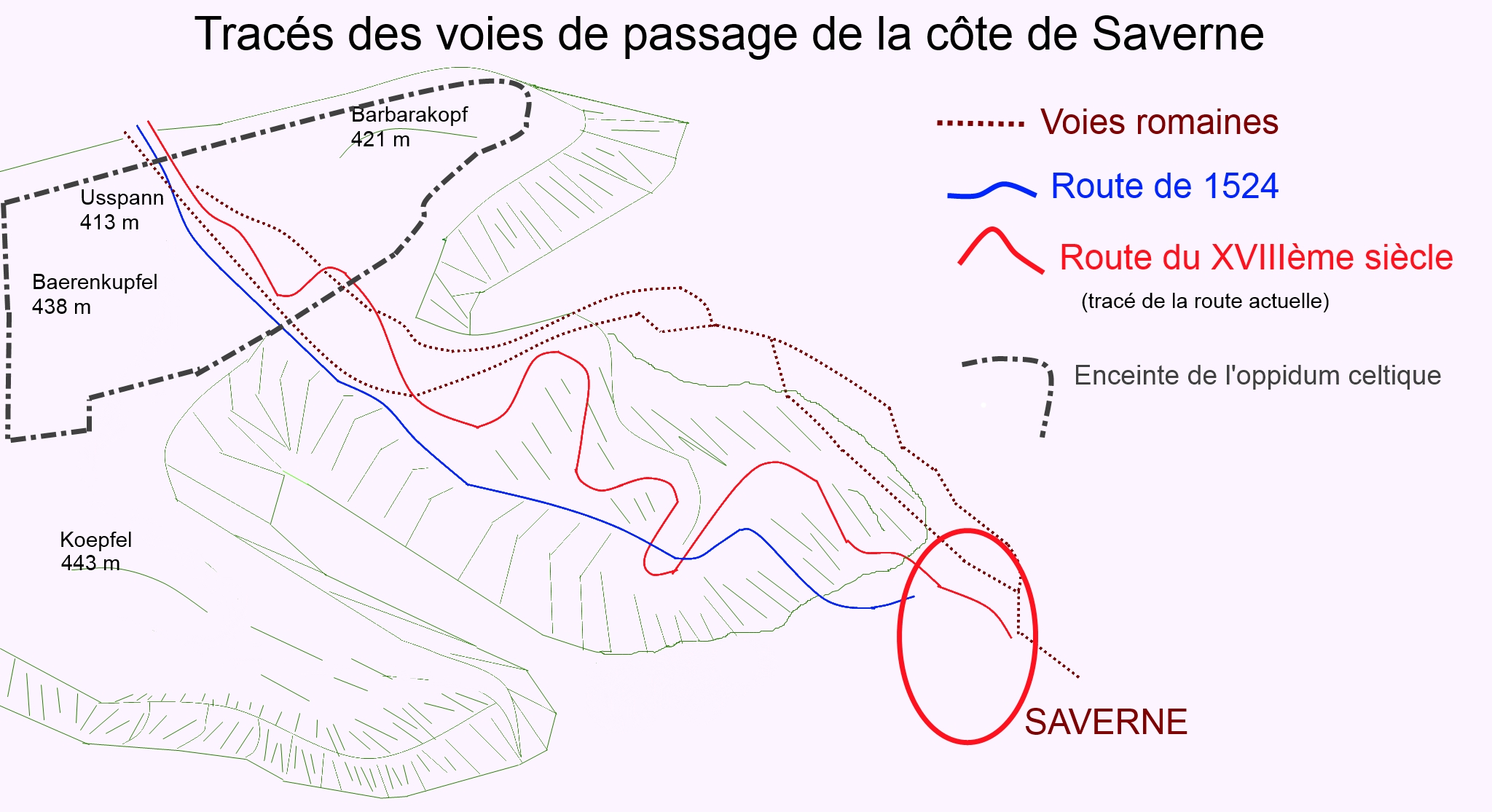 Différents tracés des voies de passage du col de Saverne